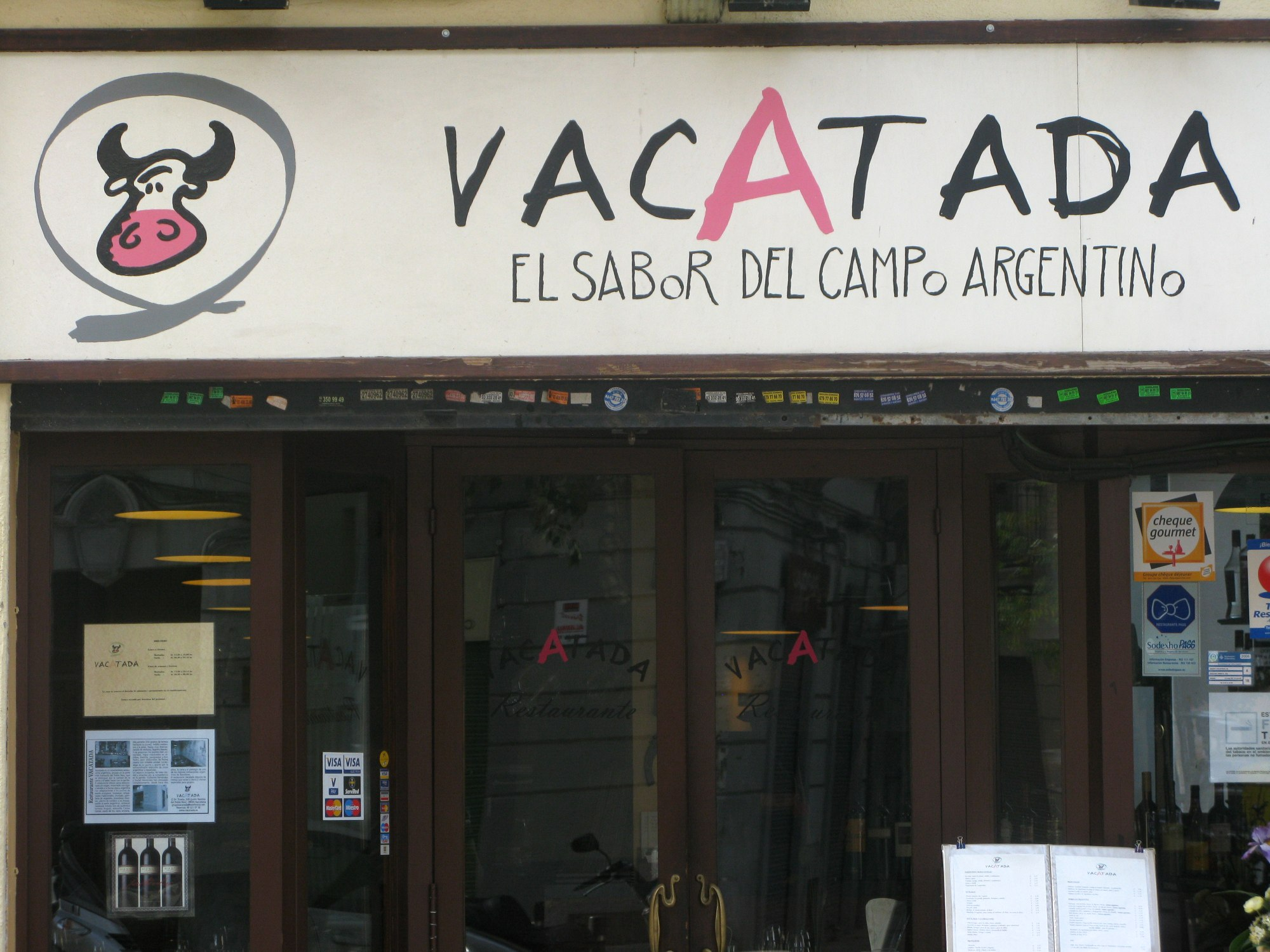 Barcelona Rambla Poblenou 35